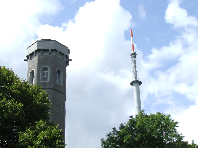 Ludwigsturm (links) auf dem Donnersberg im Hintergrund (rechts) der Sender Donnersberg